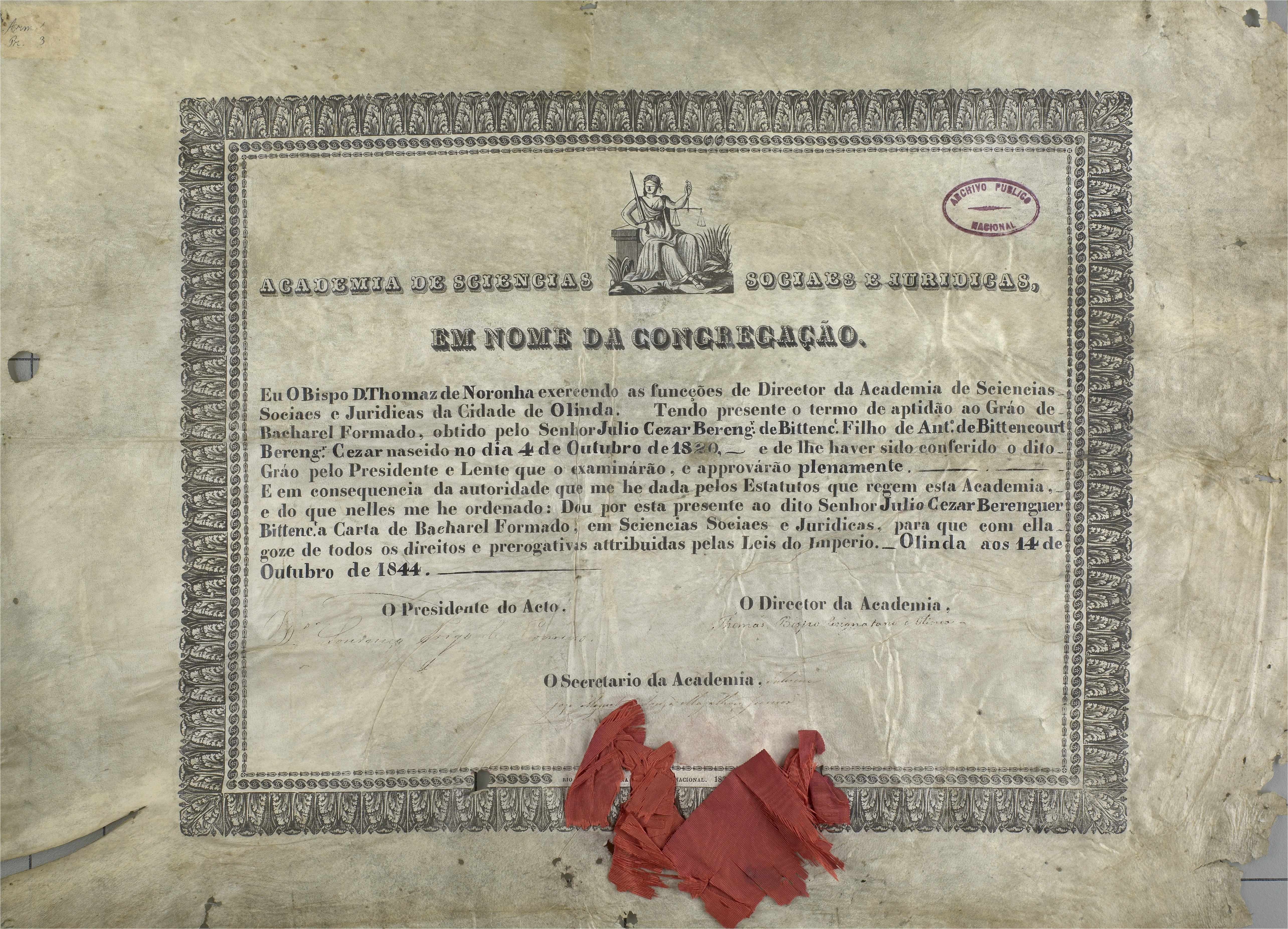 Carta de Bacharel concedida a Julio Cesar Berenguer de Bittencourt pela Academia de Ciências Sociais e Jurídicas de Olinda. Fundo Itens Documentais.